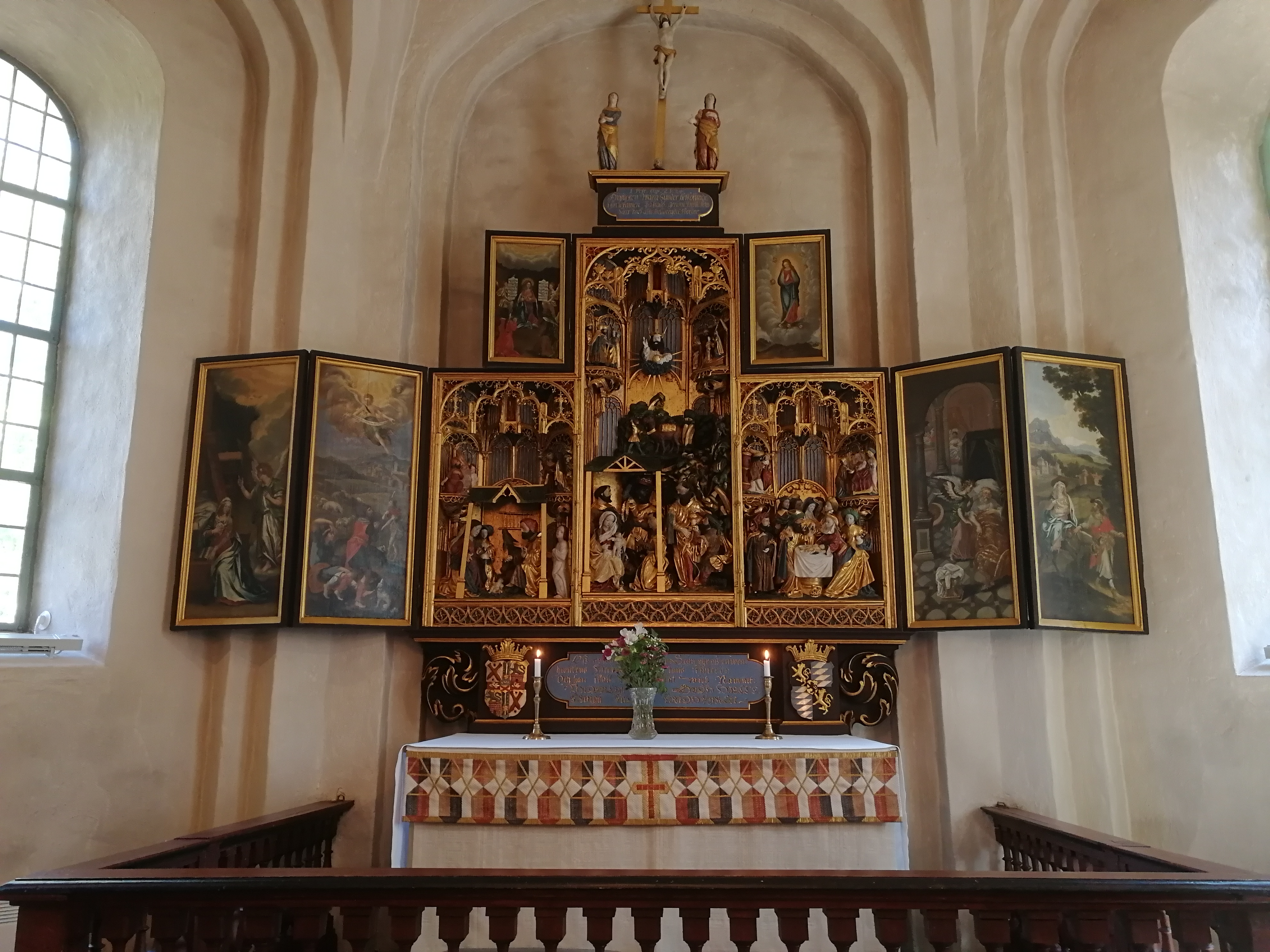 Altarskåpet av ek är hämtat från Flandern, tillverkat i Mechelen på tidigt 1500-tal.